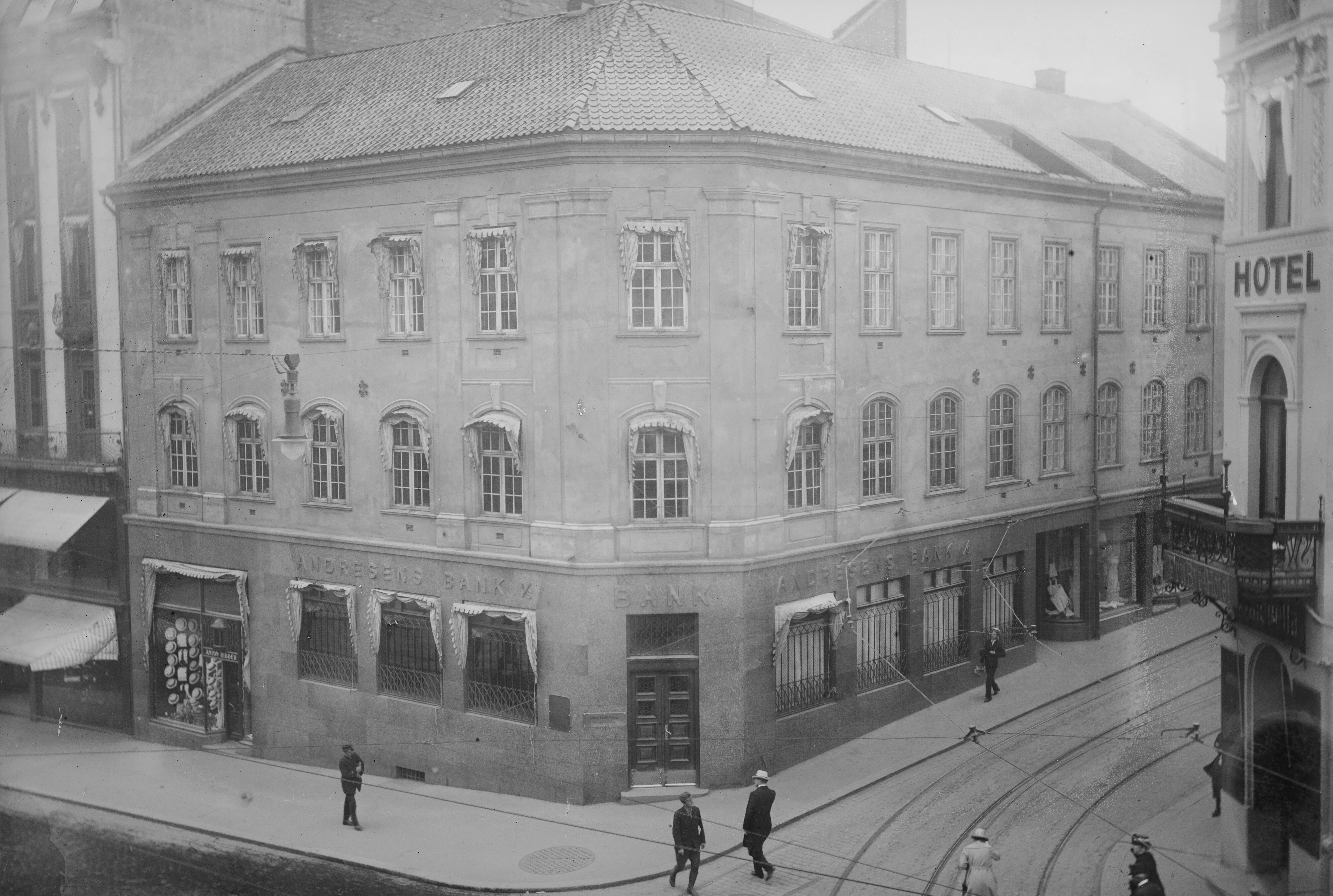 Bildet er hentet fra Nasjonalbibliotekets bildesamling. Anmerkninger til bildet var: Påskrift arkivark: Andresens bank Arkivnummer: 357 Oslo, Oslo, Oslo